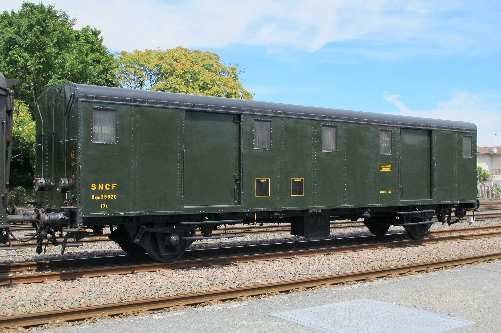 Le fourgon OCEM 39820 du Chemin de Fer Touristique Limousin Périgord en gare de Thiviers (Dordogne) le 12 juillet 2015.